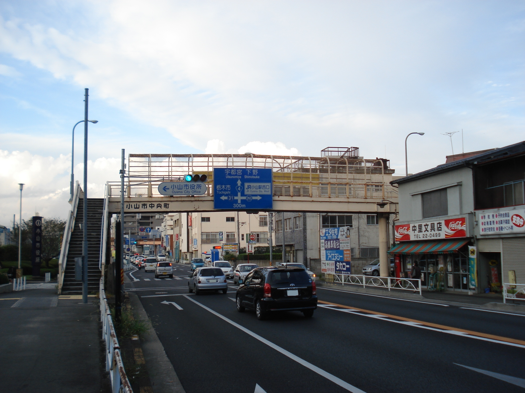 国道4号線 小山バイパス